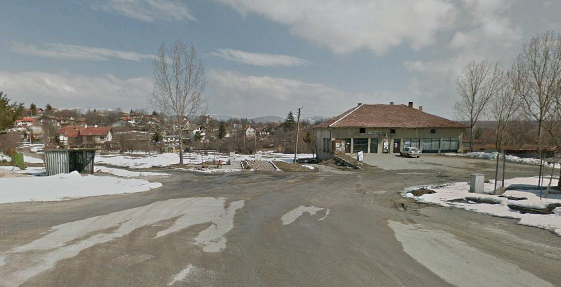 Село Извор, Софийско, Ц.пл.